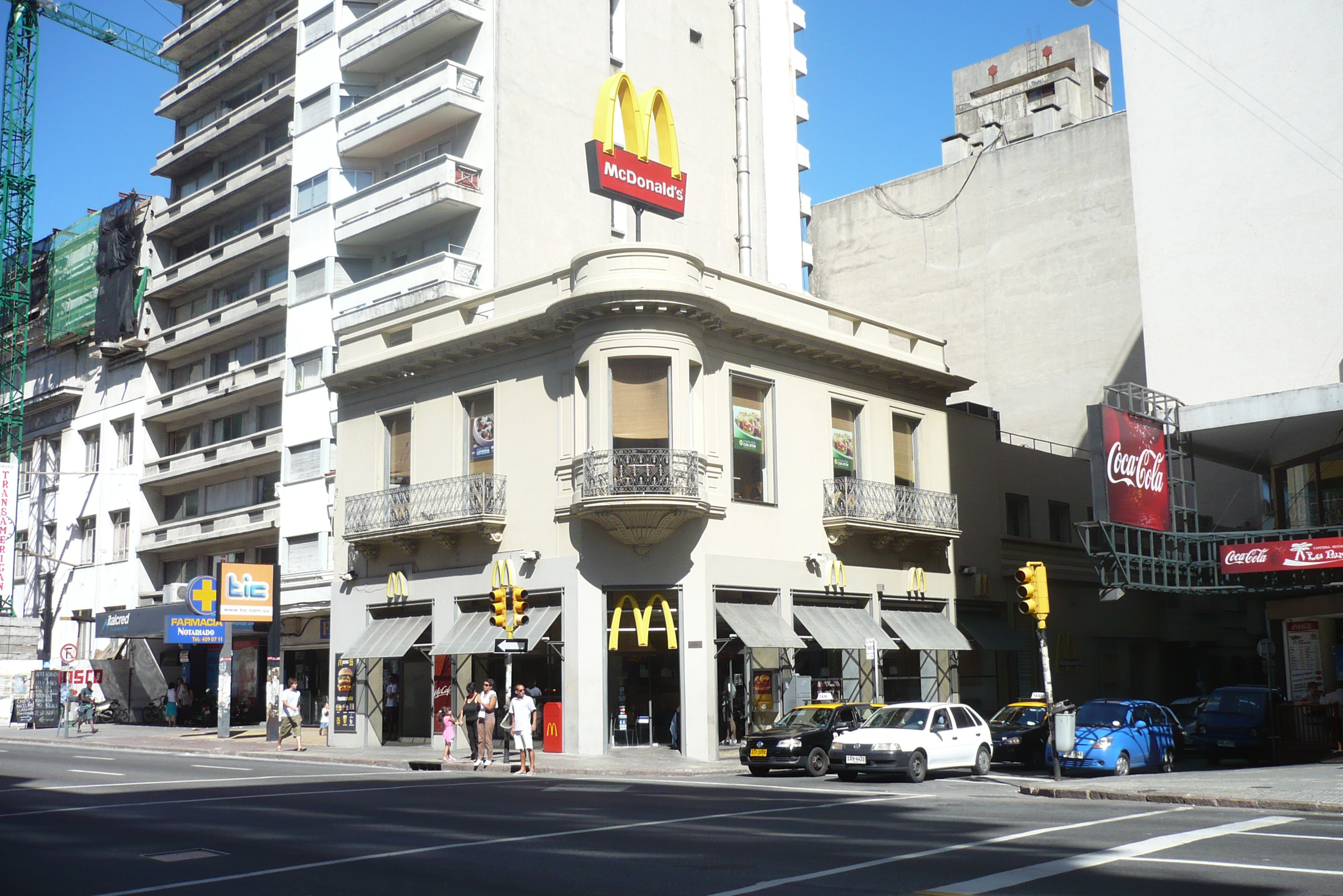 Mc Donalds - Calle 18 de Julio esquina Magallanes